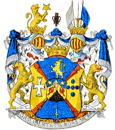 Wappen der Freiherren (schwedisch “friherre”) Stierneld, ab 1751.